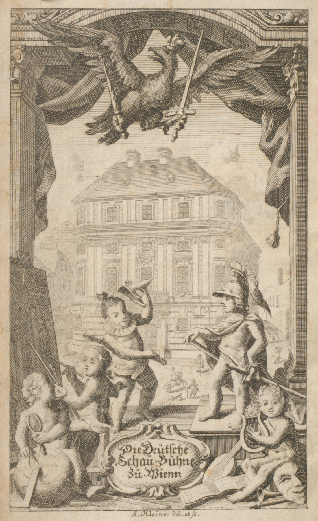 Titelkupfer aus "Die Deutsche Schaubühne zu Wienn"